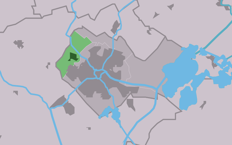 Kaartsje fan himrik fan Ysbrechtum